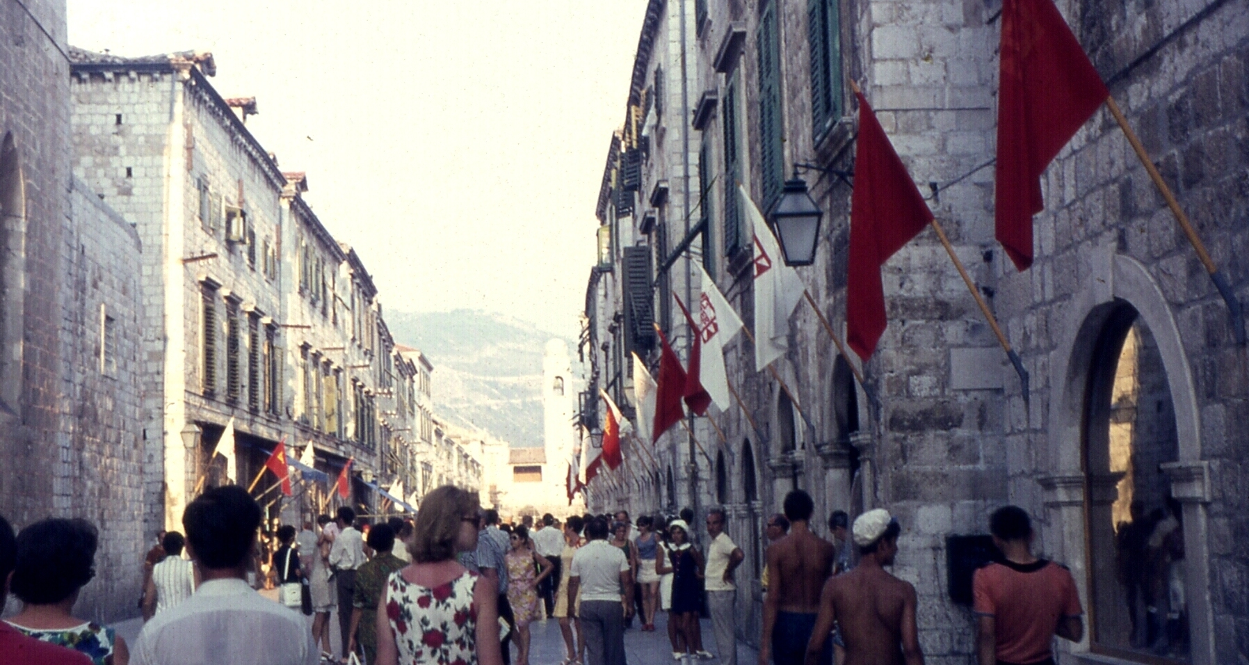 Dubrovnik1970